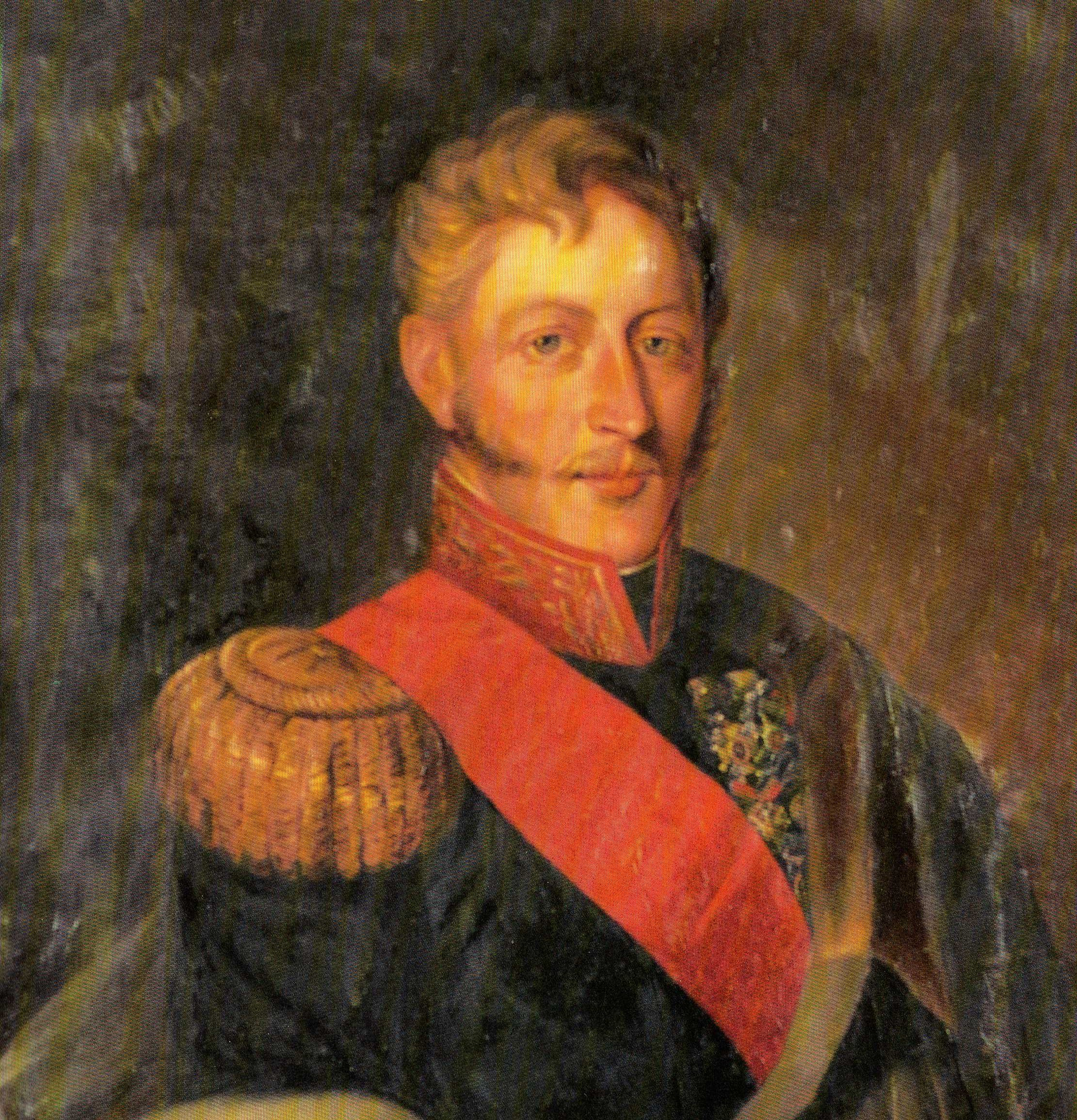 Portrait du général Otto Philipp Braun, officier allemand qui a mis son épée au service des patriotes colombiens en révolte contre l'Espagne, puis est devenu général dans l'armée bolivienne.